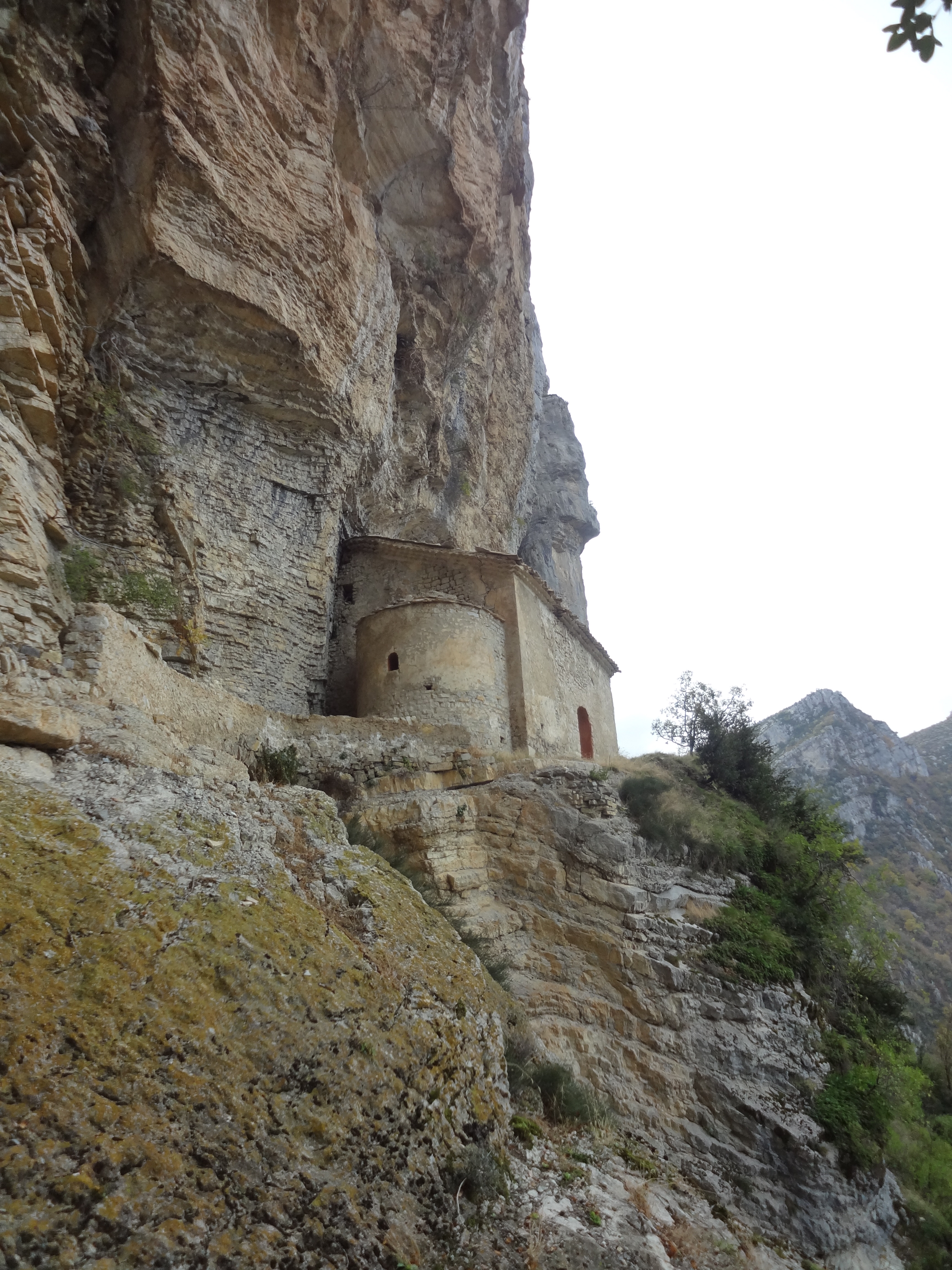 chapelle rupestre de Saint-Pons à Valbelle, XIe-XIXe